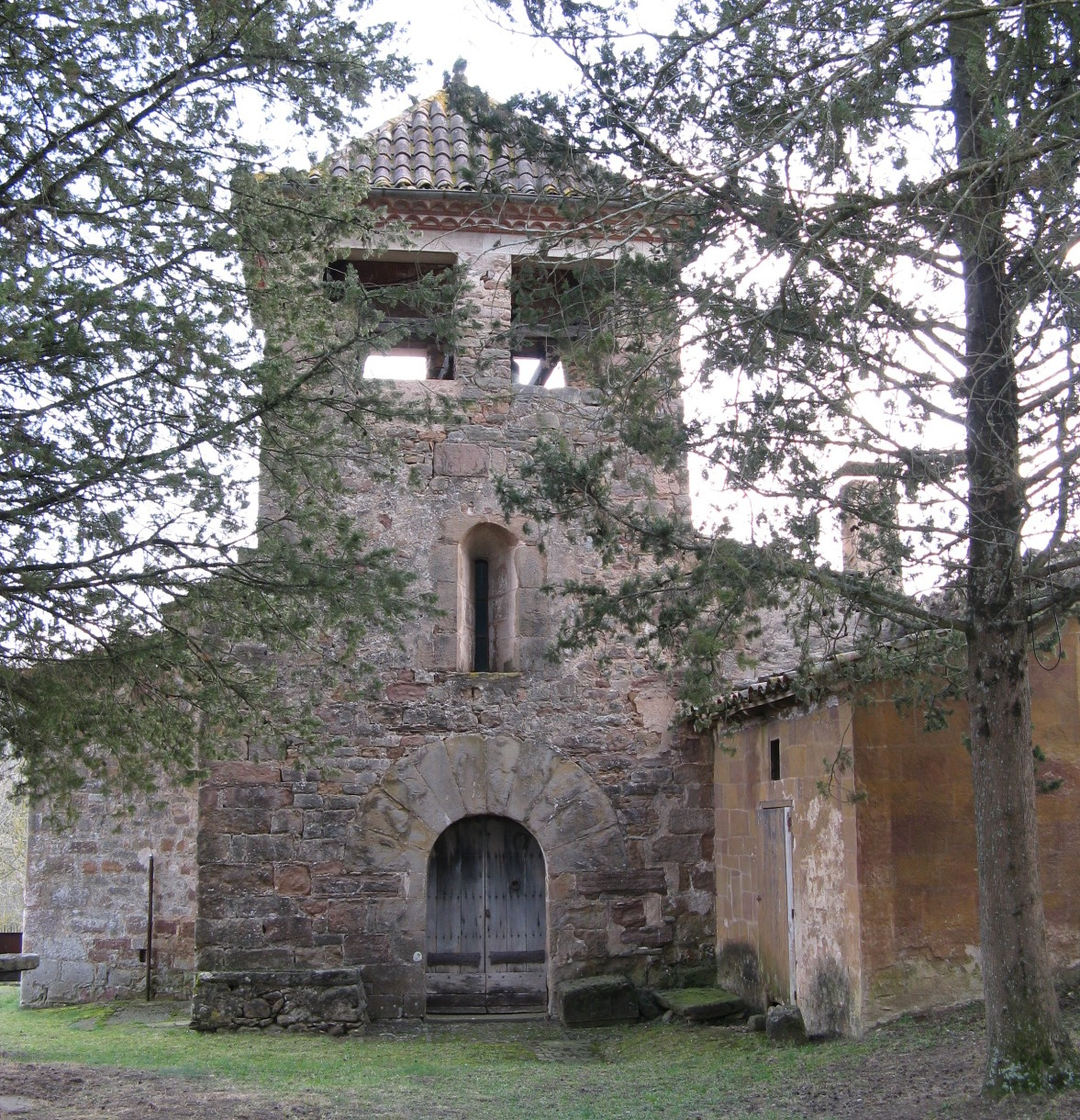 Roman Church: Sant Martí de Solamal (Val de Bianya (near Olot), Catalunya, Spain)